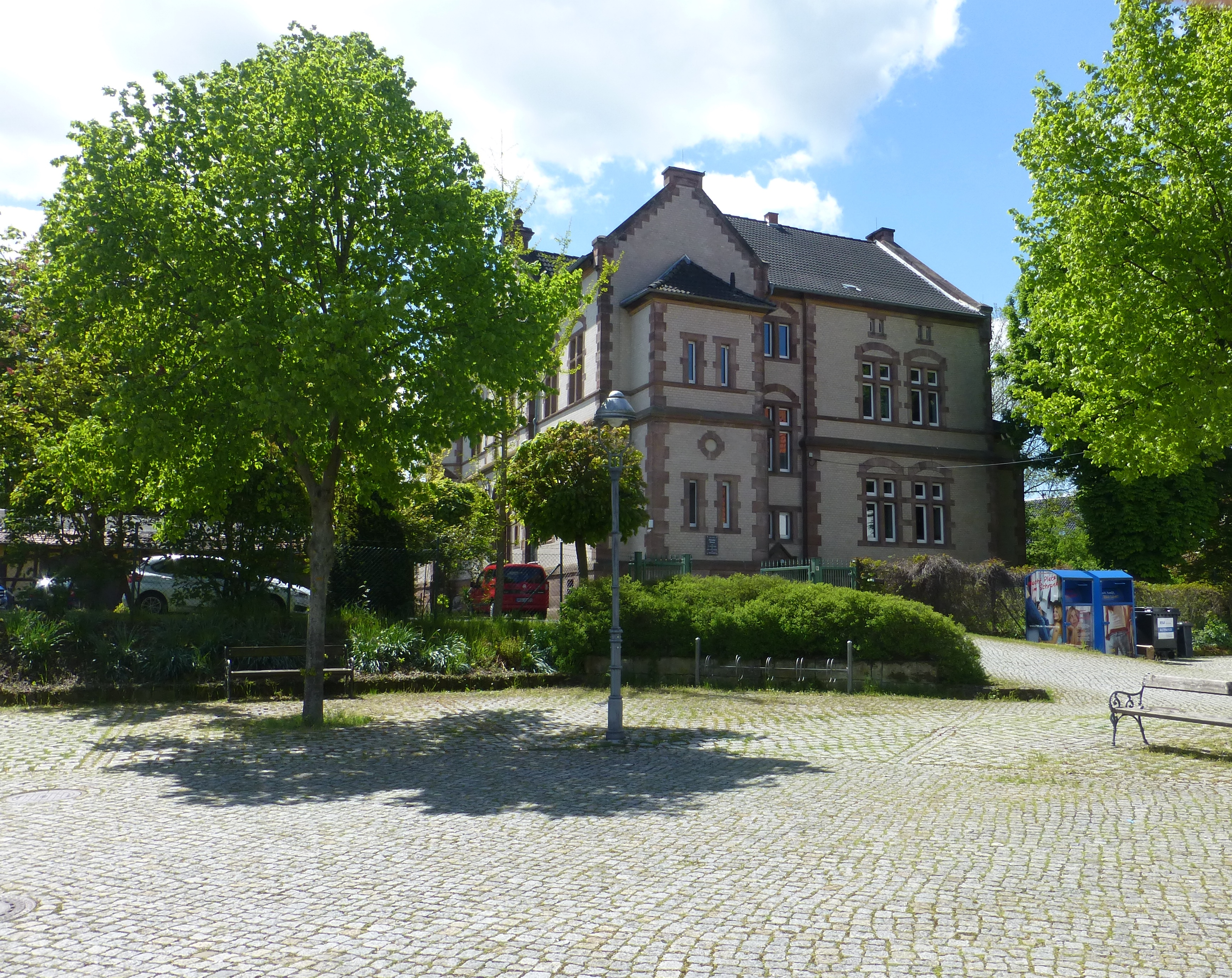 Ehemaliger Oberhof in Teistungen